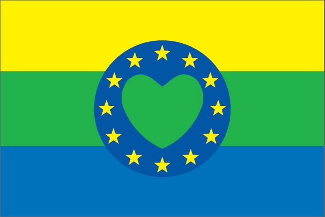 Bandiera Lunezia (Emilia-Lunense) La bandiera è stata adottata dall'Associazione onlus "Regione Lunezia" per rappresentare un territorio comprensivo di alcune province del nord Italia.